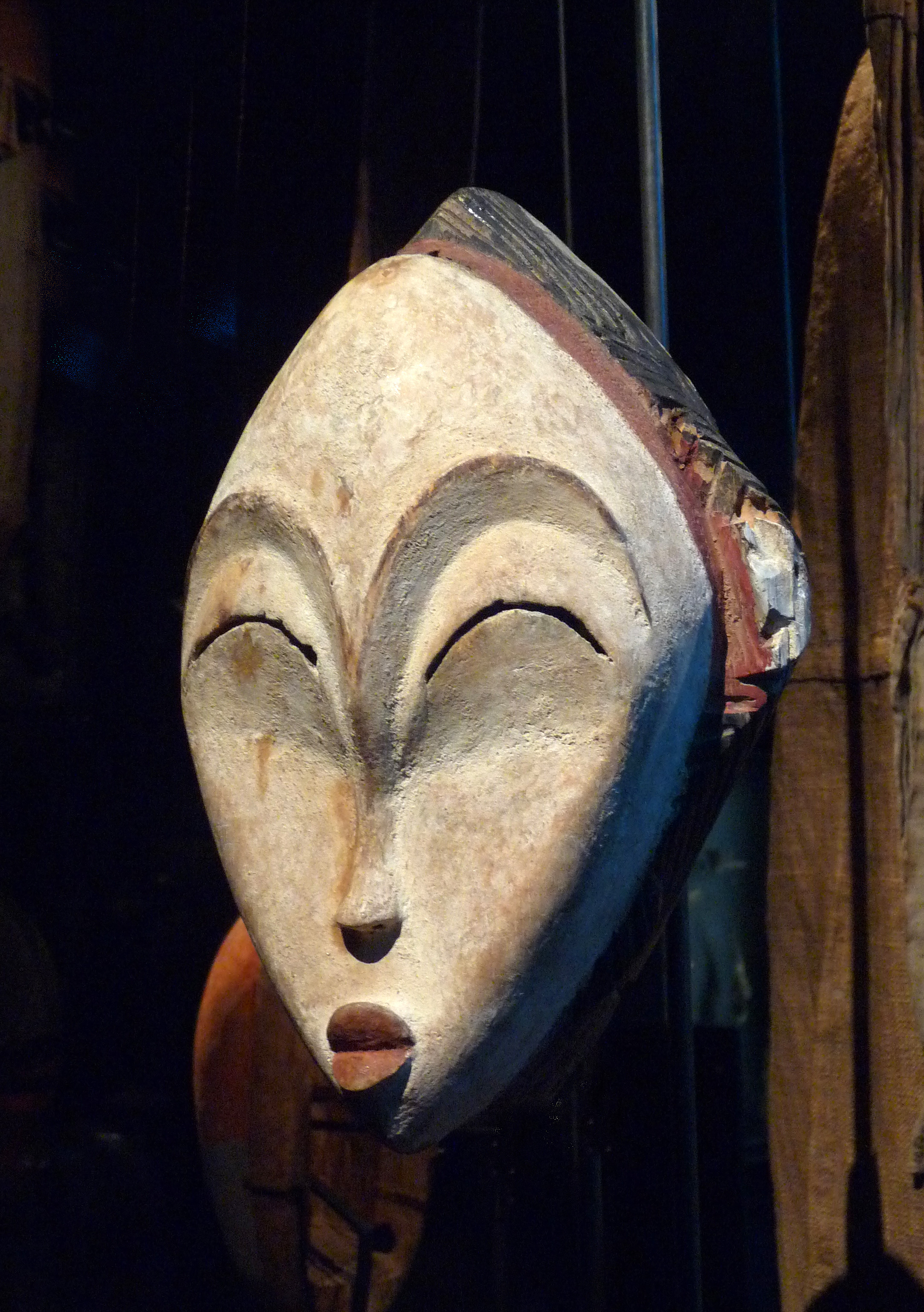 Masque anthropomorphe blanc, population Punu, Gabon (mukudj ?). 19e-début 20e siècle. Bois, pigments noir, rouge et kaolin. 25 x 17,5 x 11,5 cm. Musée du quai Branly. Inv. 71.1965.52.1. « Masque blanc du Gabon méridional, dont le style varie suivant les peuples qui les utilisent. Ces masques manifestent la présence des défunts au sein d'un village à l'occasion de certaines activités religieuses ou juridiques. » : Notice du musée.